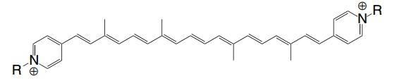 Estructura de la molécula de carobiologeno